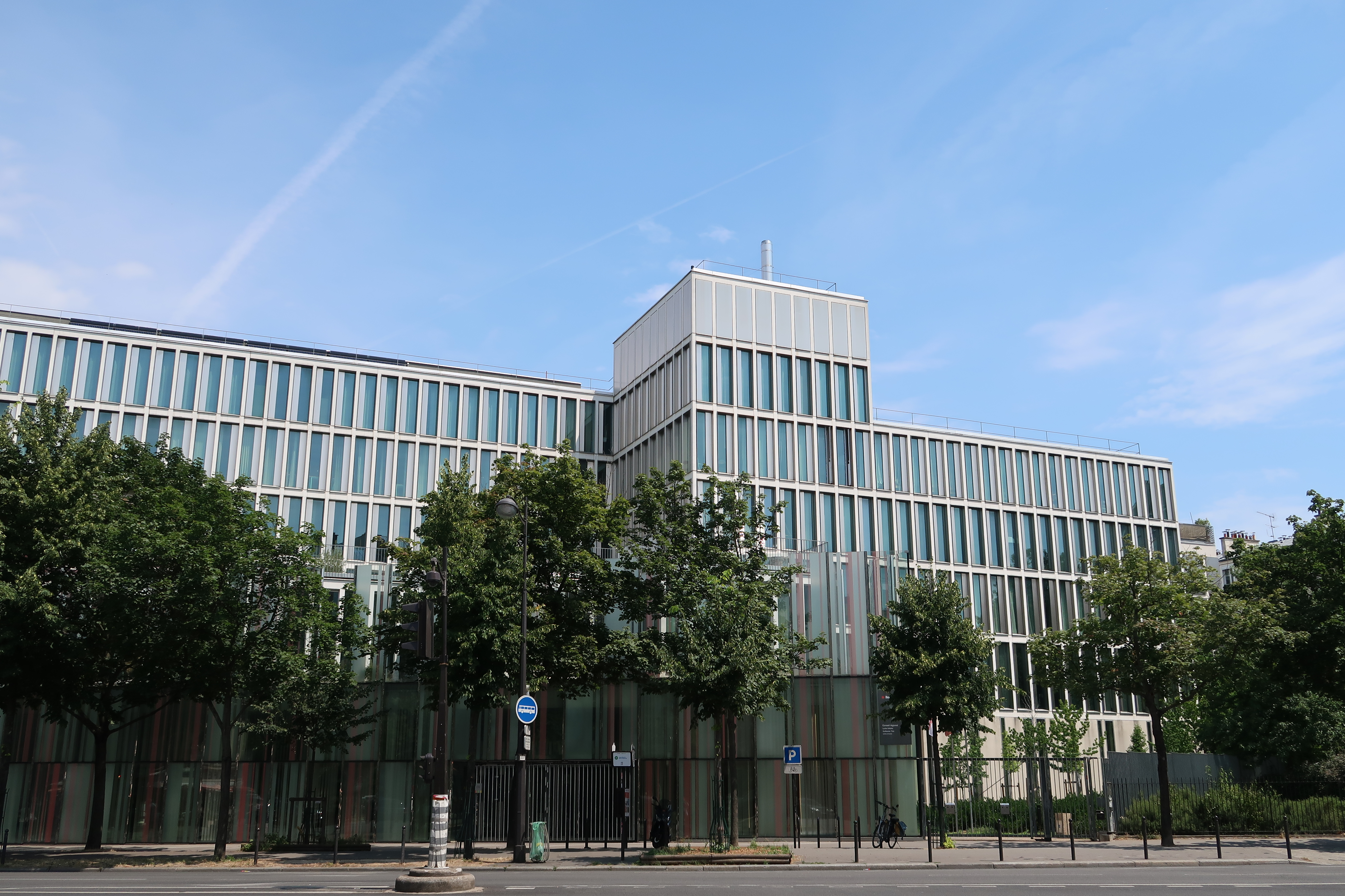 Lycée hôtelier Guillaume-Tirel, 237 boulevard Raspail (Paris, 14e).